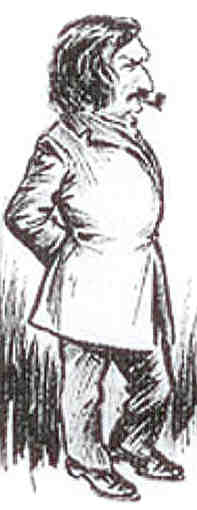 Portrait du chansonnier révolutionnaire Charles Gille (1820-1856)